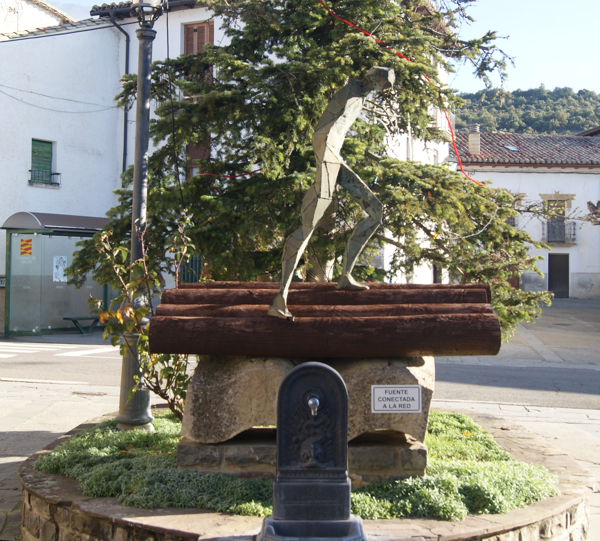 Sigüés (Homenaje al Almadiero)